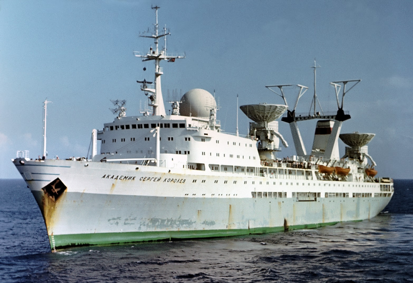 Научно-исследовательское судно СКИ ОМЭР АН СССР "Академик Сергей Королёв"